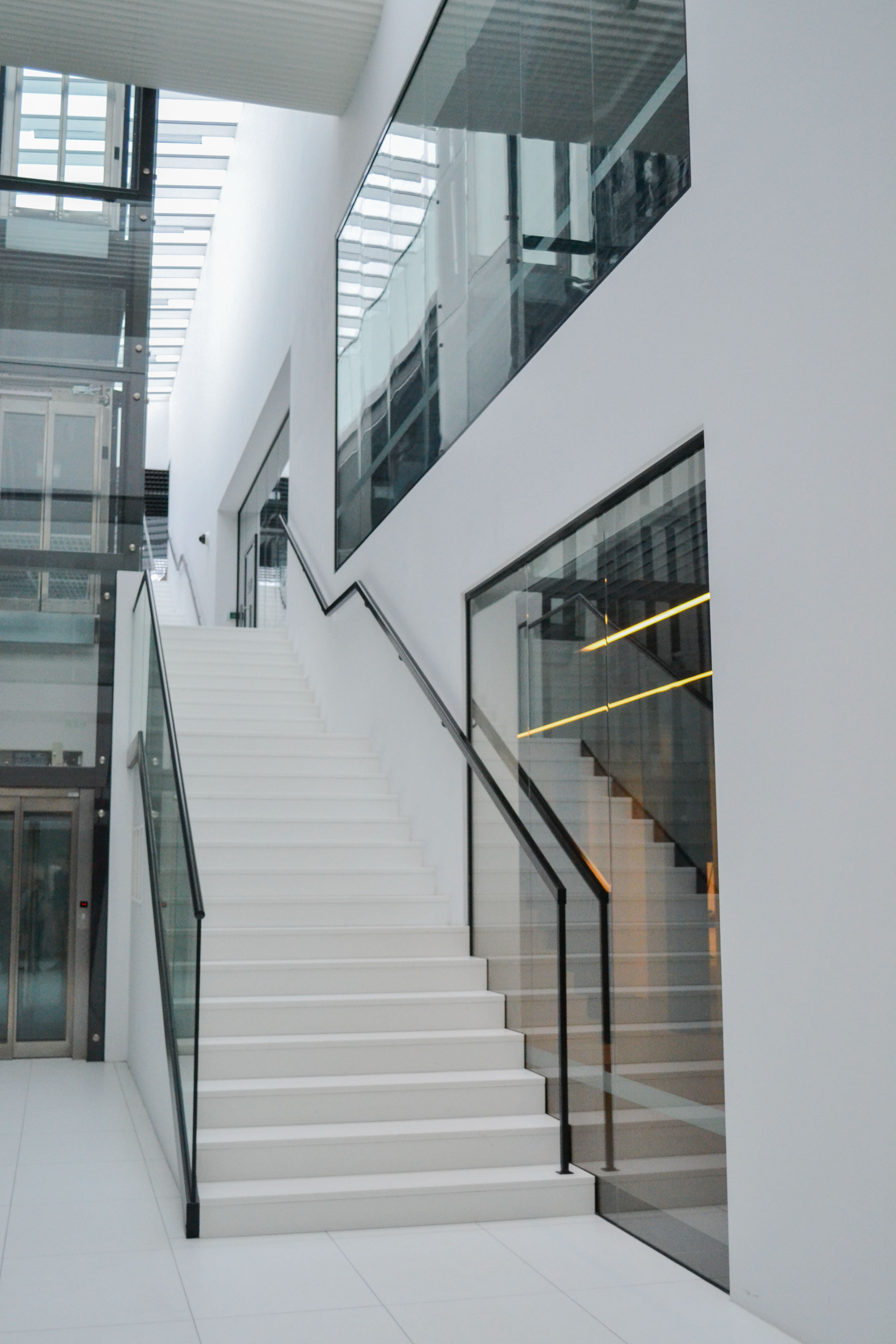 MCSW Elektrownia w Radomiu - klatka schodowa